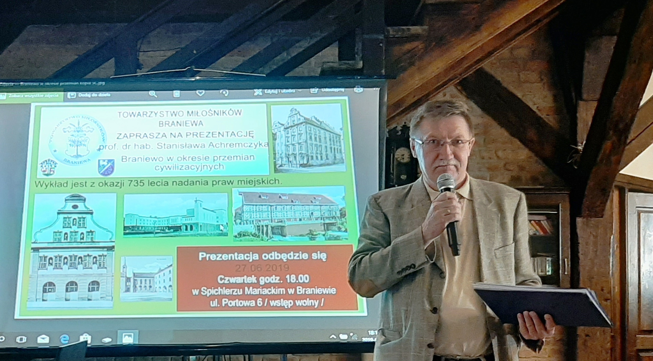 Stanisław Achremczyk, wykład 27 czerwca 2019, Spichlerz Mariacki w Braniewie, Towarzystwo Miłośników Braniewa